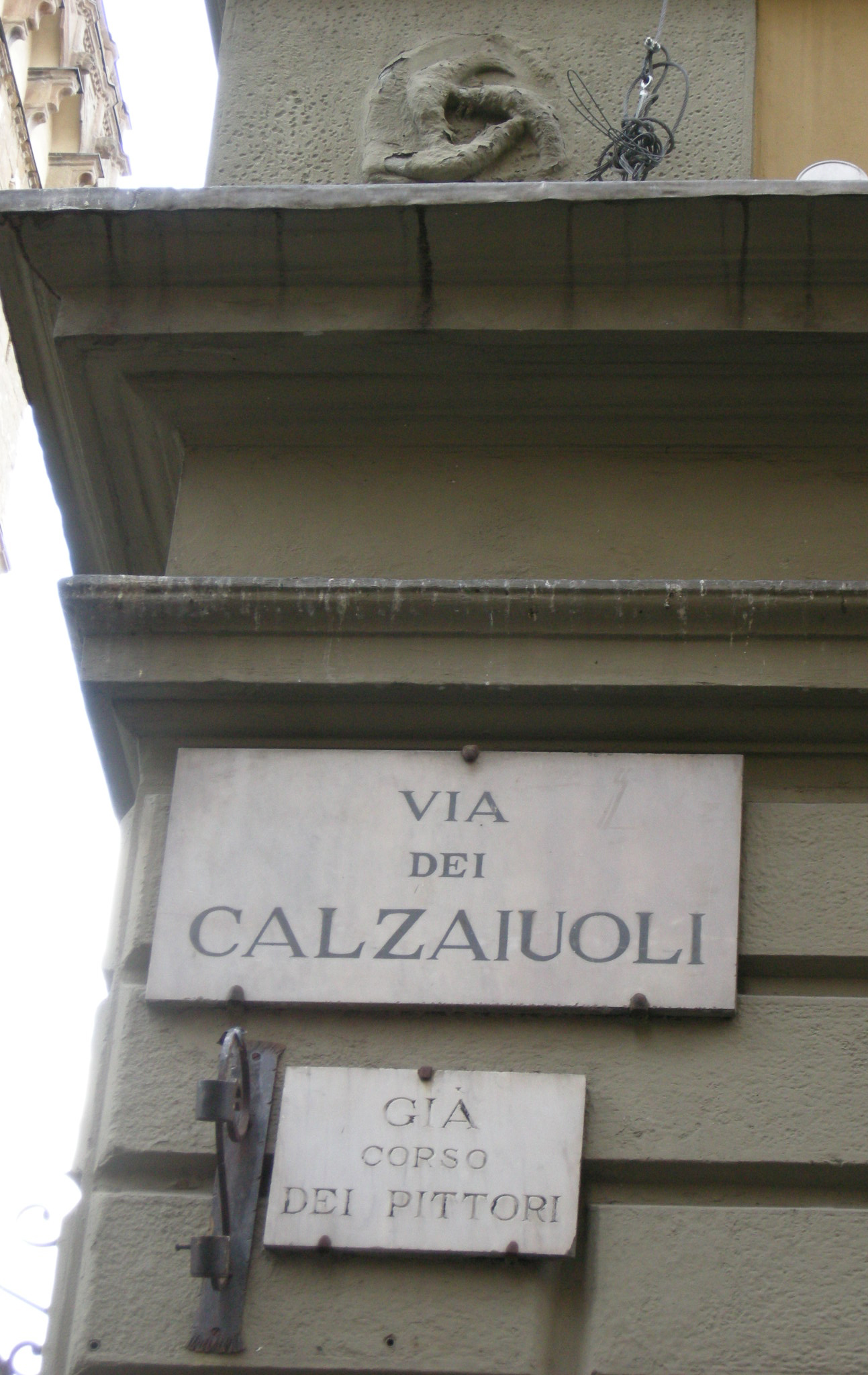 Via de' calzaiuoli, lapide corso dei pittori